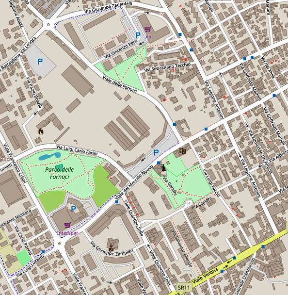 Mappa San Giuseppe Mercato Fornaci